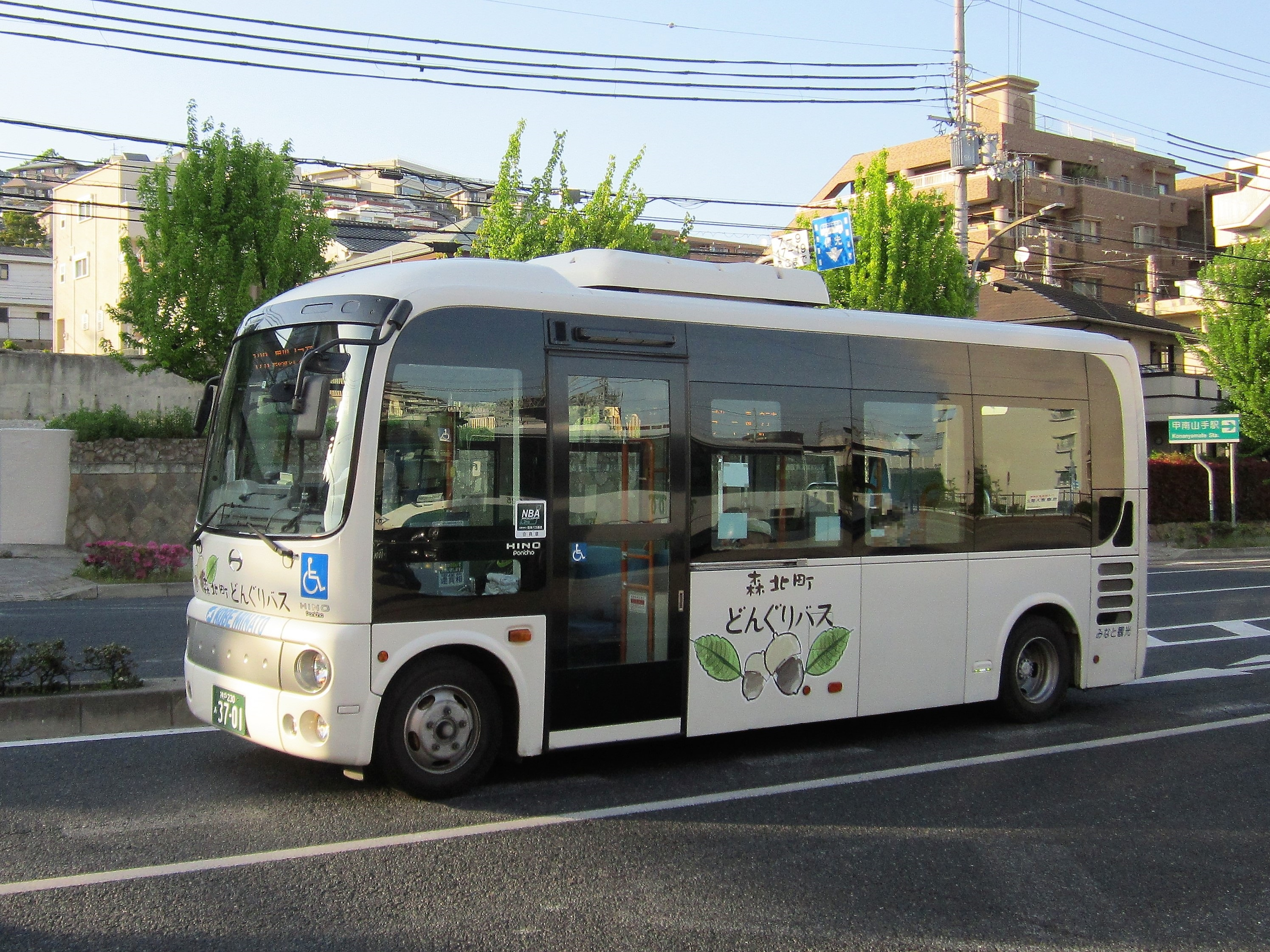 甲南山手駅付近を走行する森北町どんぐりバス